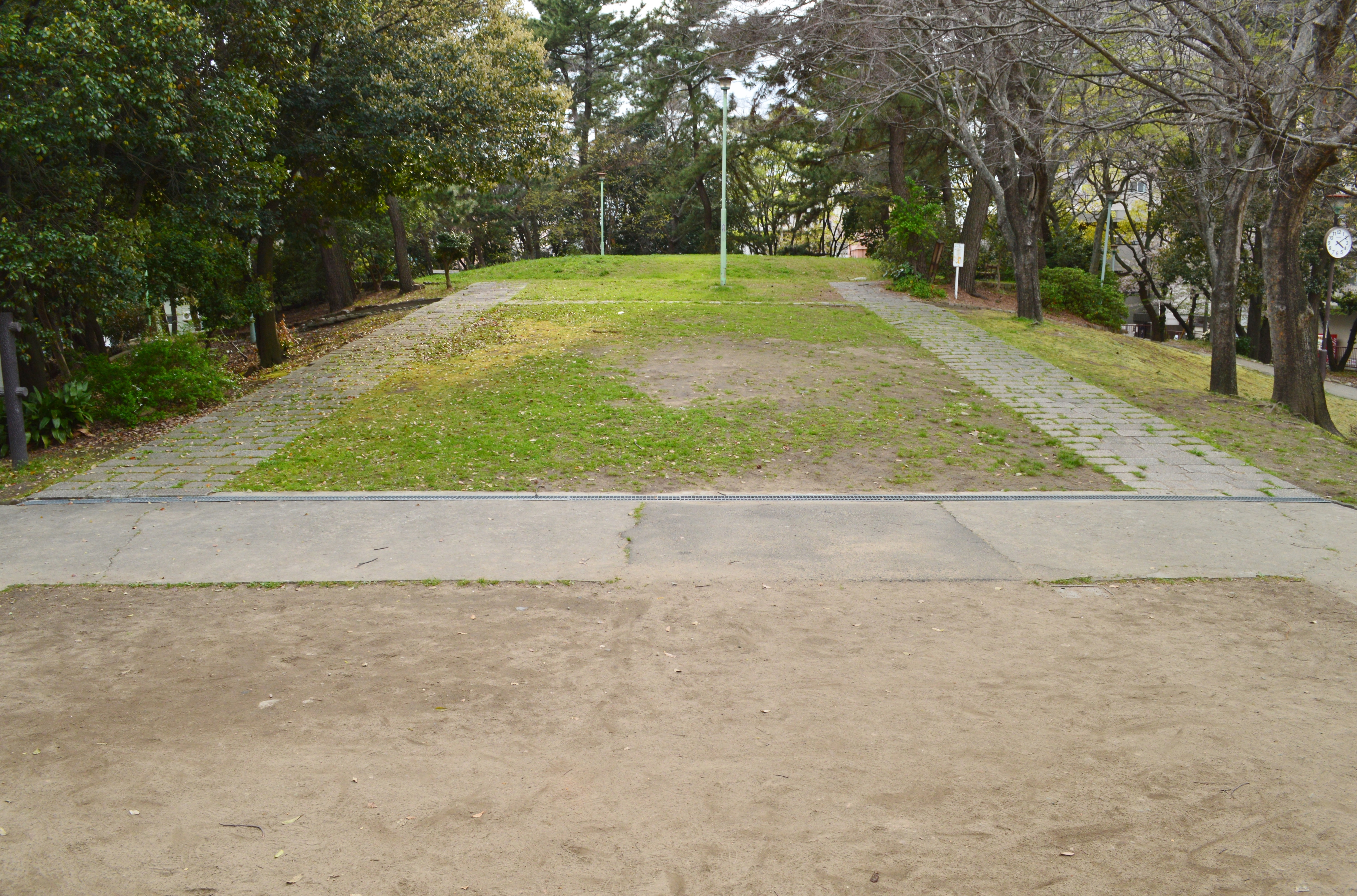 西求女塚古墳 前方部から後方部を望む